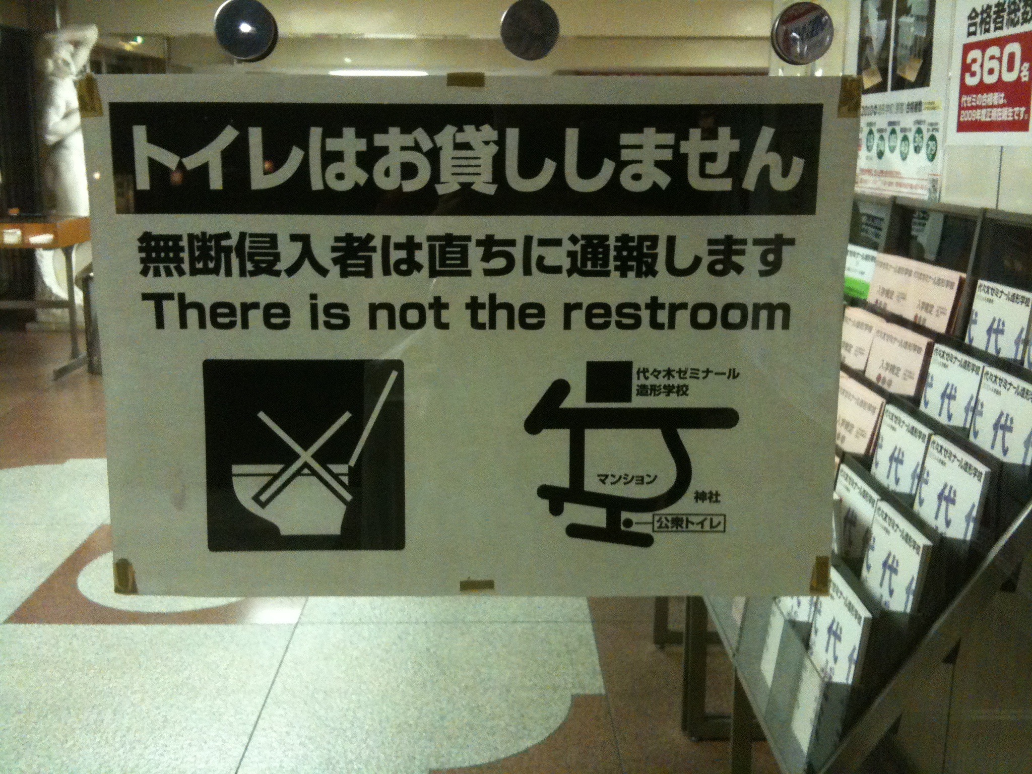 Posted by トイレはお貸ししません無断侵入者は直ちに通報します